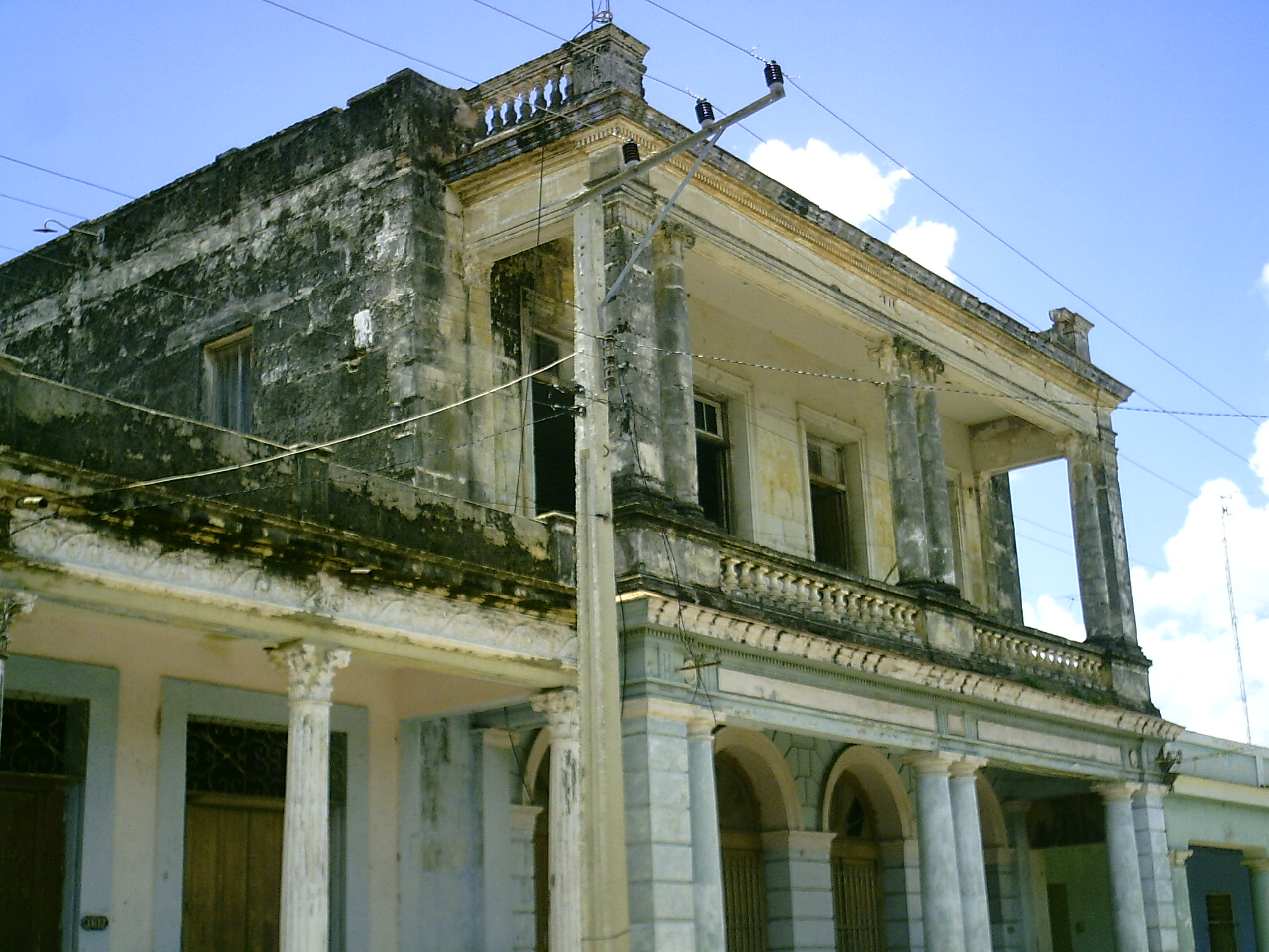 Edifio principal de mi pueblo